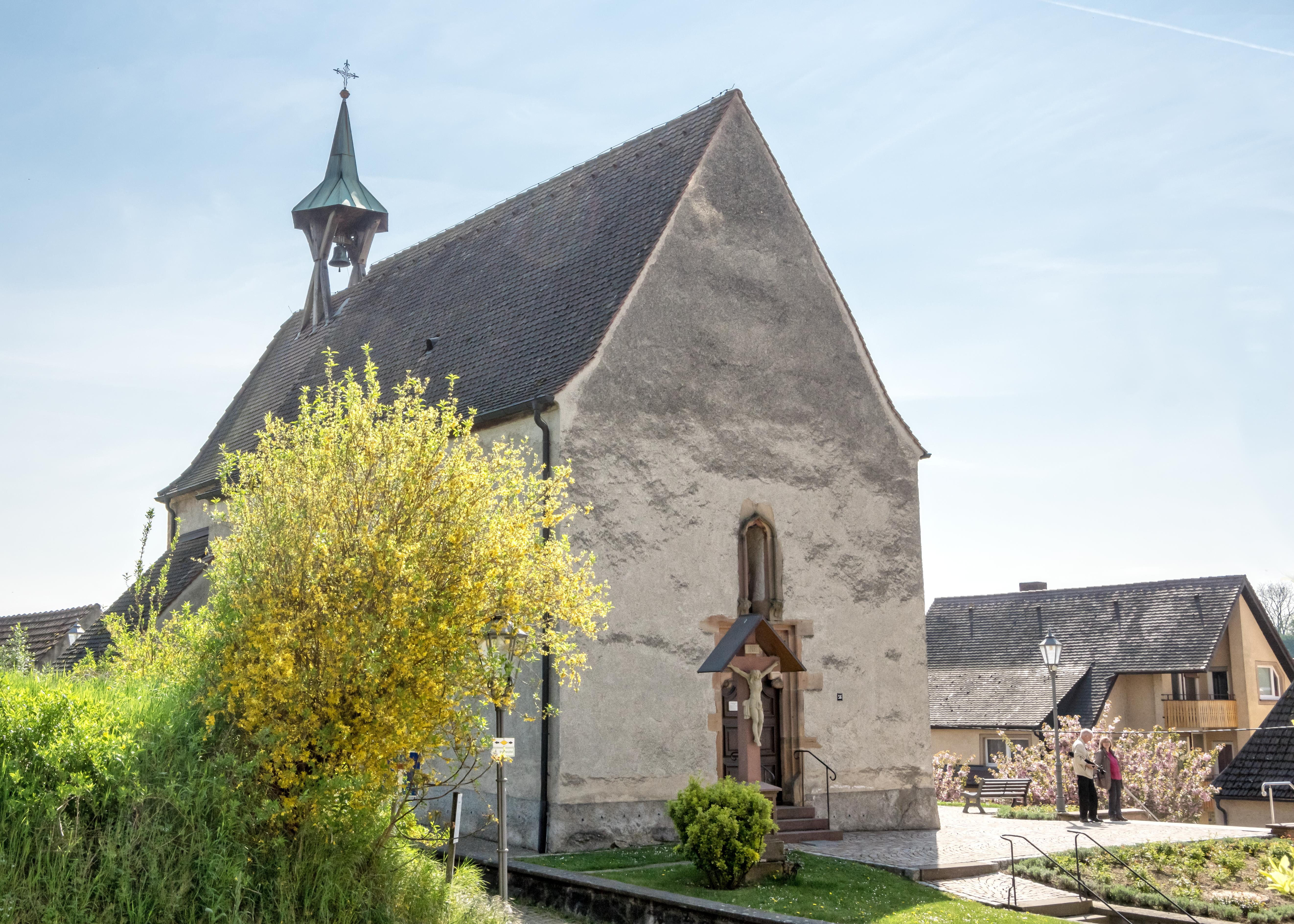 St. Alban in Bötzingen. Sie wurde erbaut um 1480 und war eine ehemalige Kirche des Deutsch-Ordens. Im Volksmund wird sie Peschdkirche genannt. Im Innern sind einige kunstgeschichtliche Kleinode Die katholische Kirche St. Alban in Bötzingen Oberschaffhausen